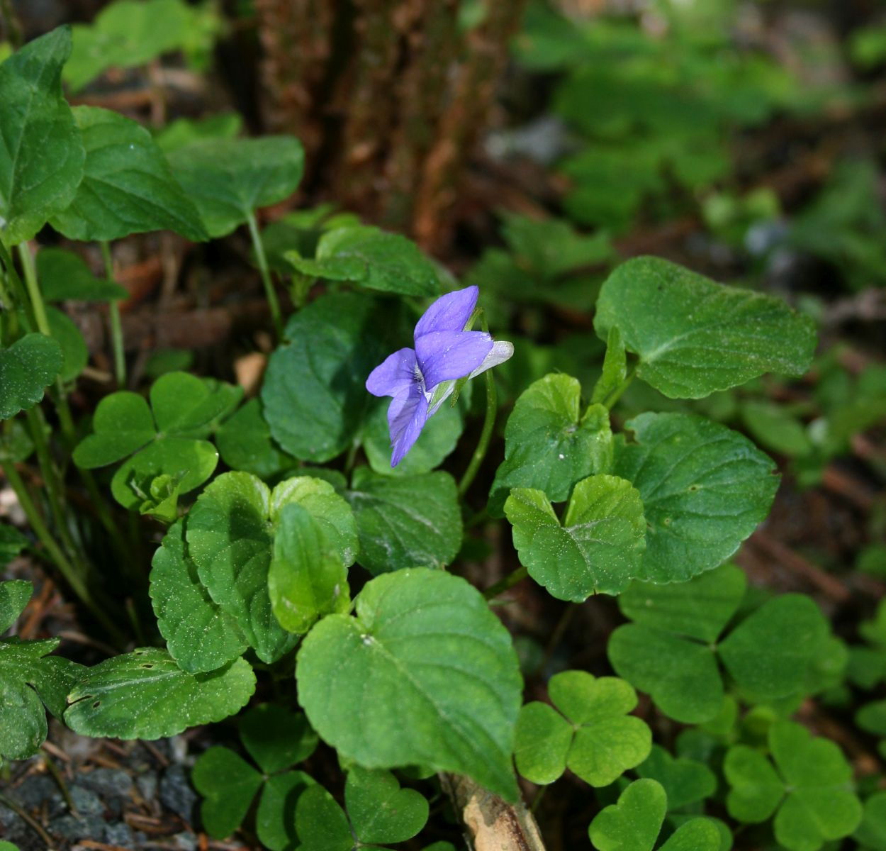 Hain-Veilchen (Viola riviniana), Veilchengewächse (Violaceae) – Österreich/Austria/Autriche: Tirol, Kitzbüheler Alpen, Jochbergwald ca. 2,5 km N Pass Thurn, ca. 1060 m